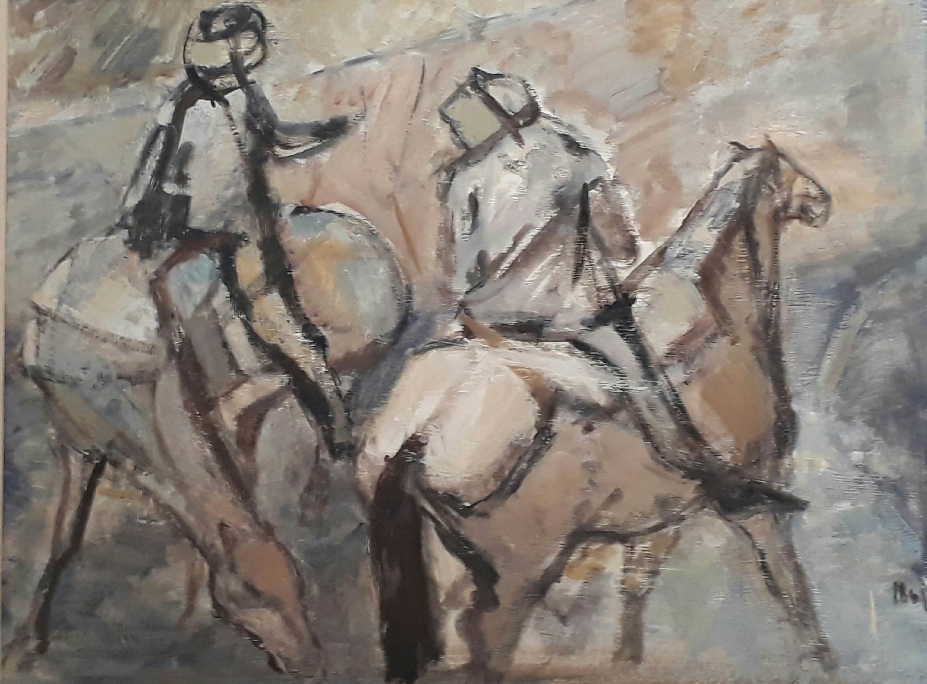 Motiv fra vingården Santa Anastasia